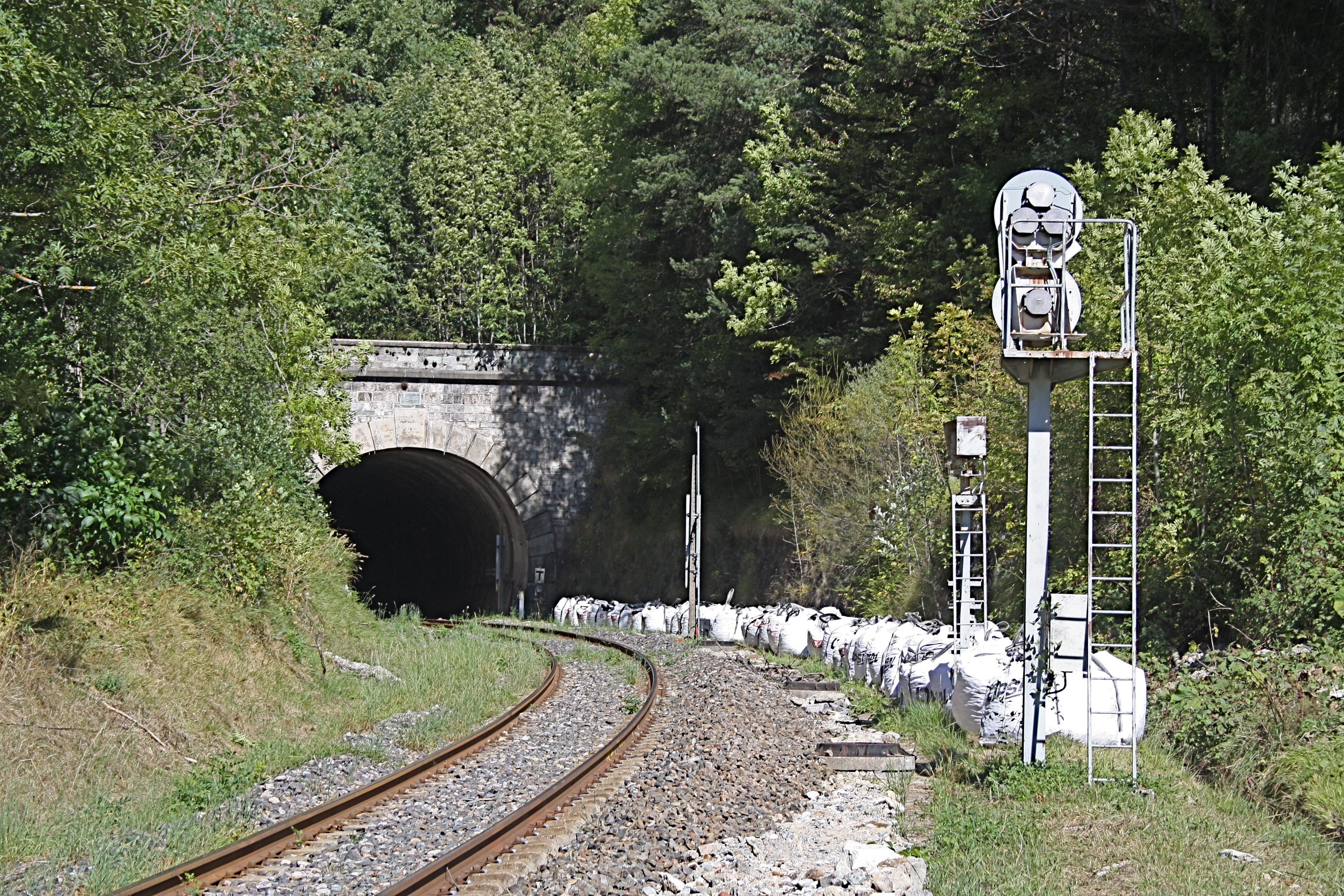 Tunnel ferroviaire du col de Tende, côté français